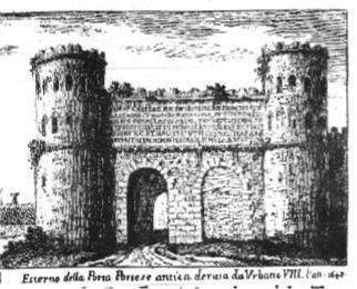 Porta Portuensis. Drawing of Giuseppe Vasi made in 1743 based on older drawings.